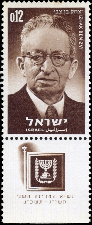 בול יצחק בן-צבי